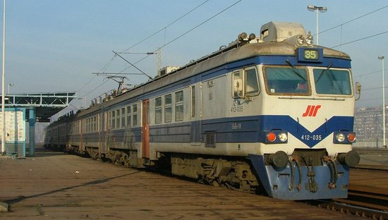 Type de train circulant sur le réseau Beovoz, le "RER" de Belgrade, la capitale de la Serbie